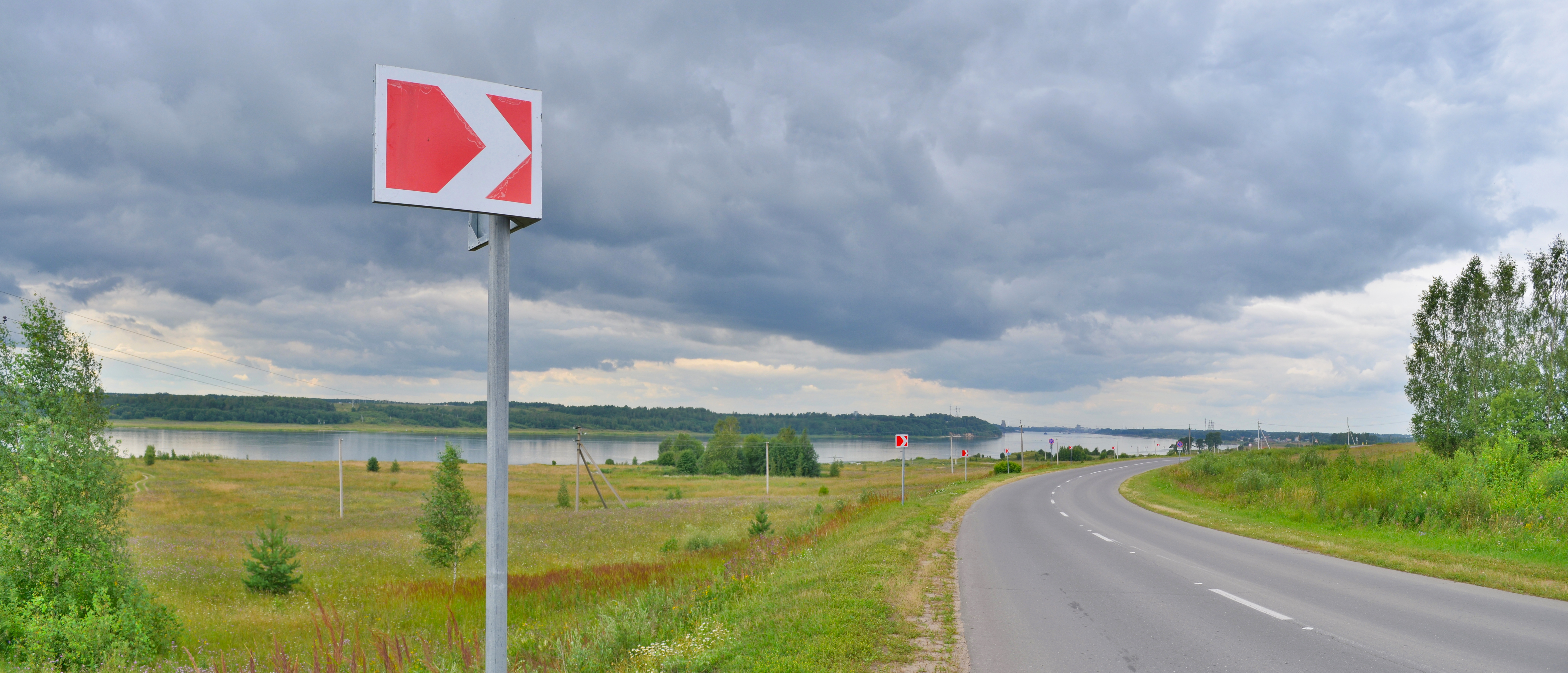 Спас.-на горизонте Рыбинск